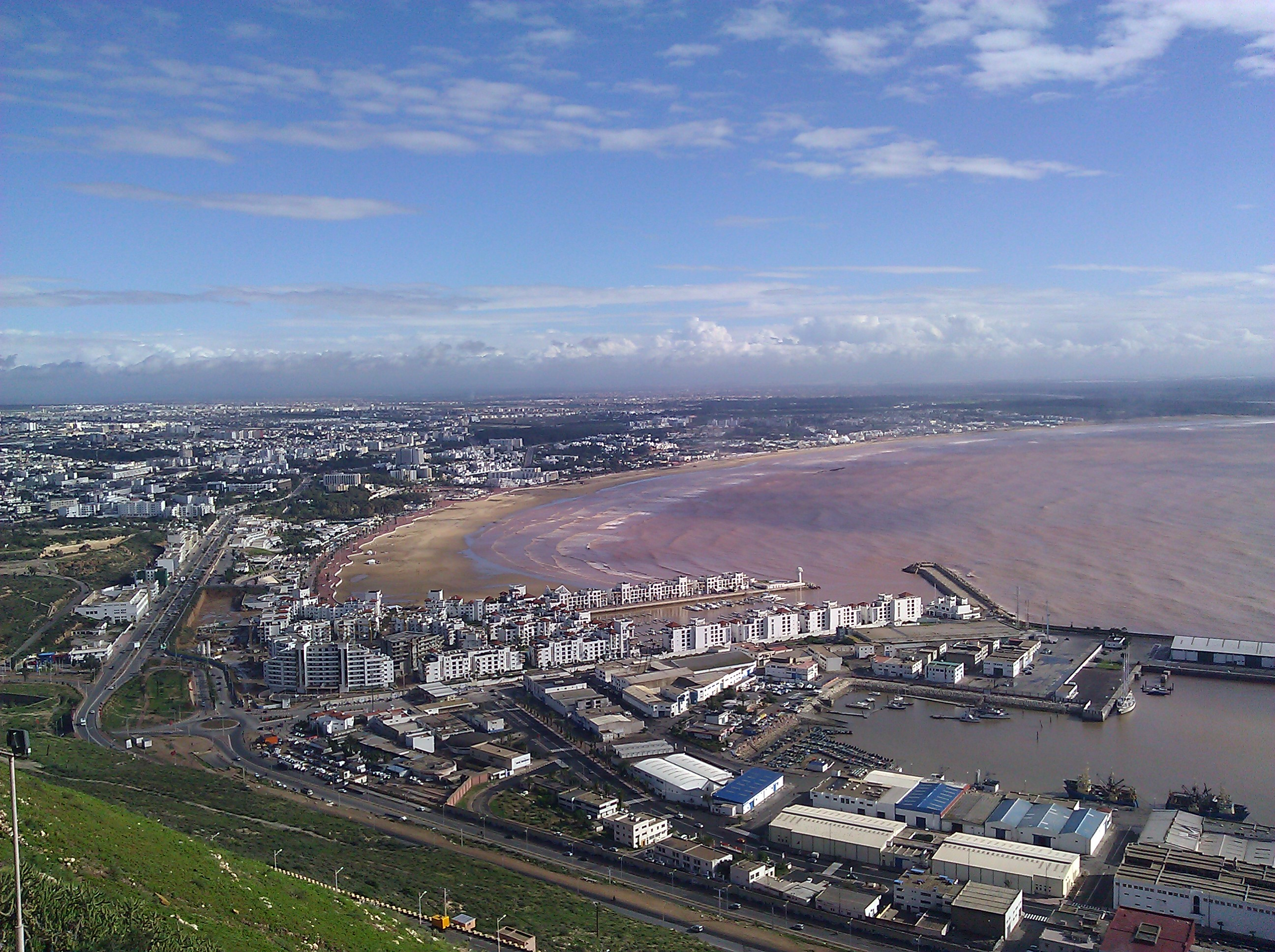 Agadir, Morocco